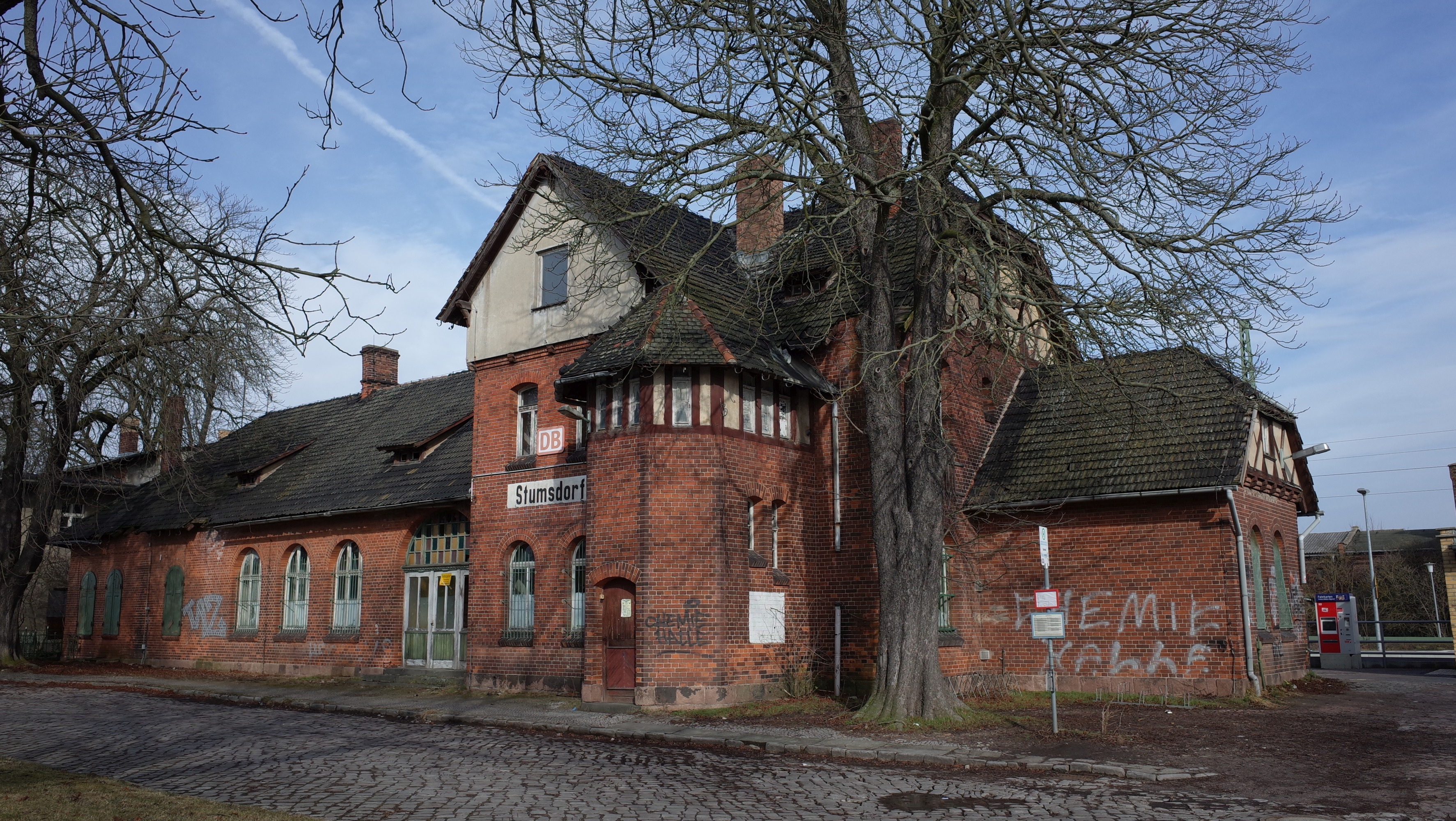 Zörbig, Bahnhof im Ortsteil Stumsdorf. (Baudenkmal im Denkmalverzeichniss Sachsen-Anhalt, Erfassungsnummer: 094 95162 000 000 000 000 [1])